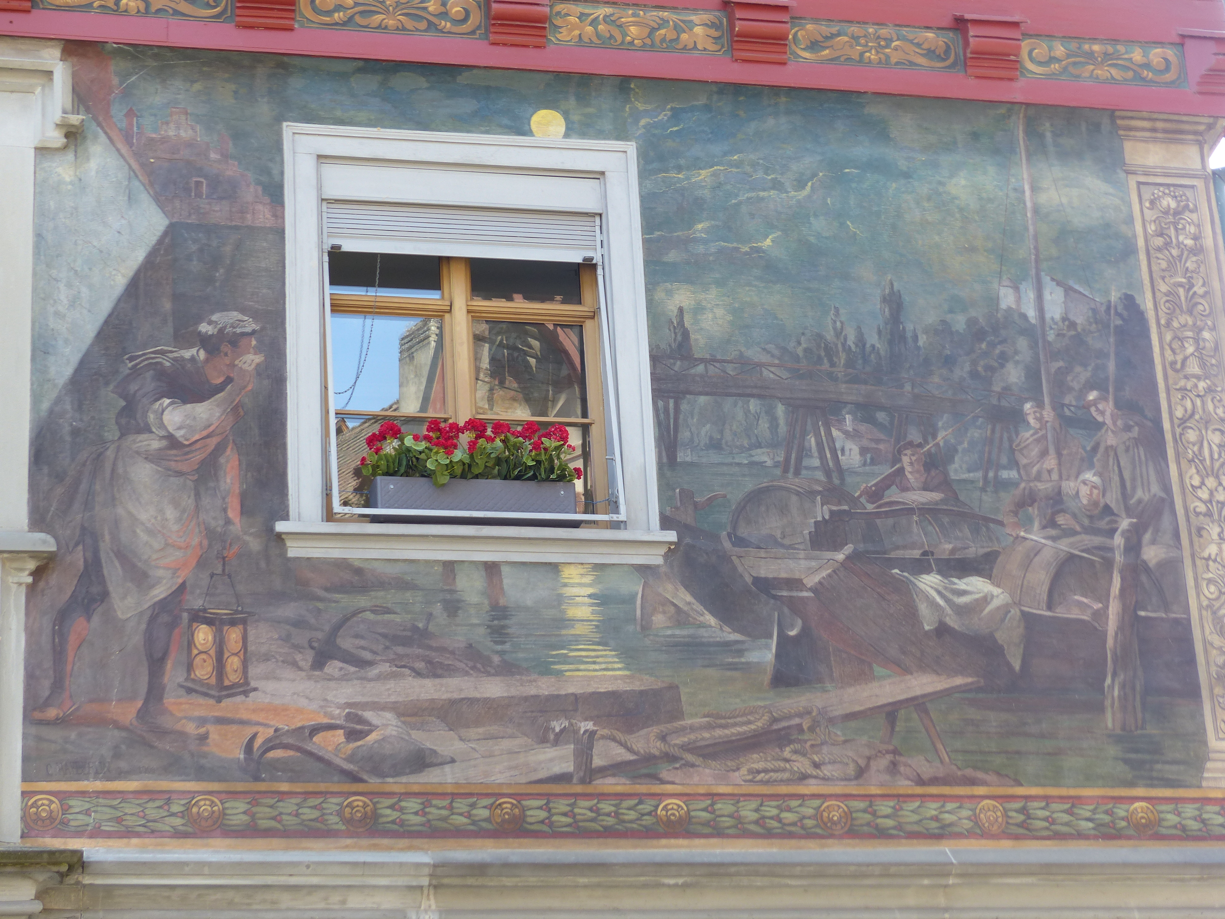 Mit dem Ruf "No e Wili!“ (Noch ein Weilchen!) wurde 1478 der Überfall durch den umliegenden Adel auf Stein verhindert (Carl von Haeberlin, Westfassade zur Marktseite)